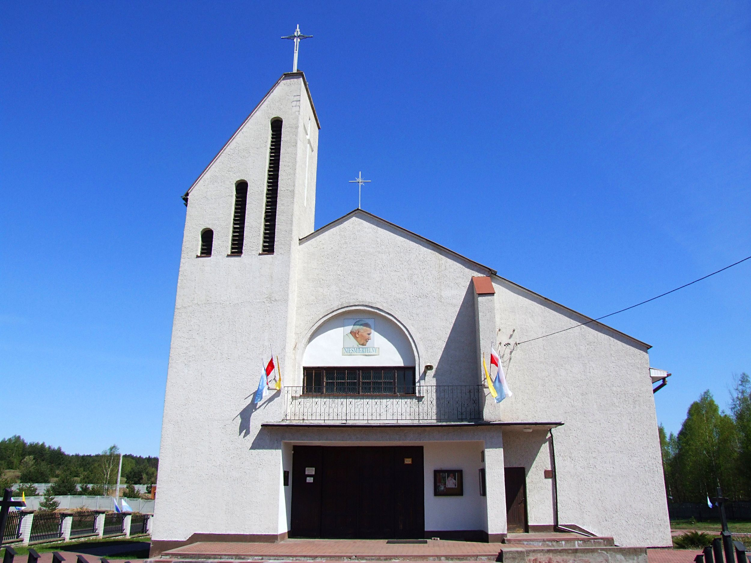 Majków - Kościół